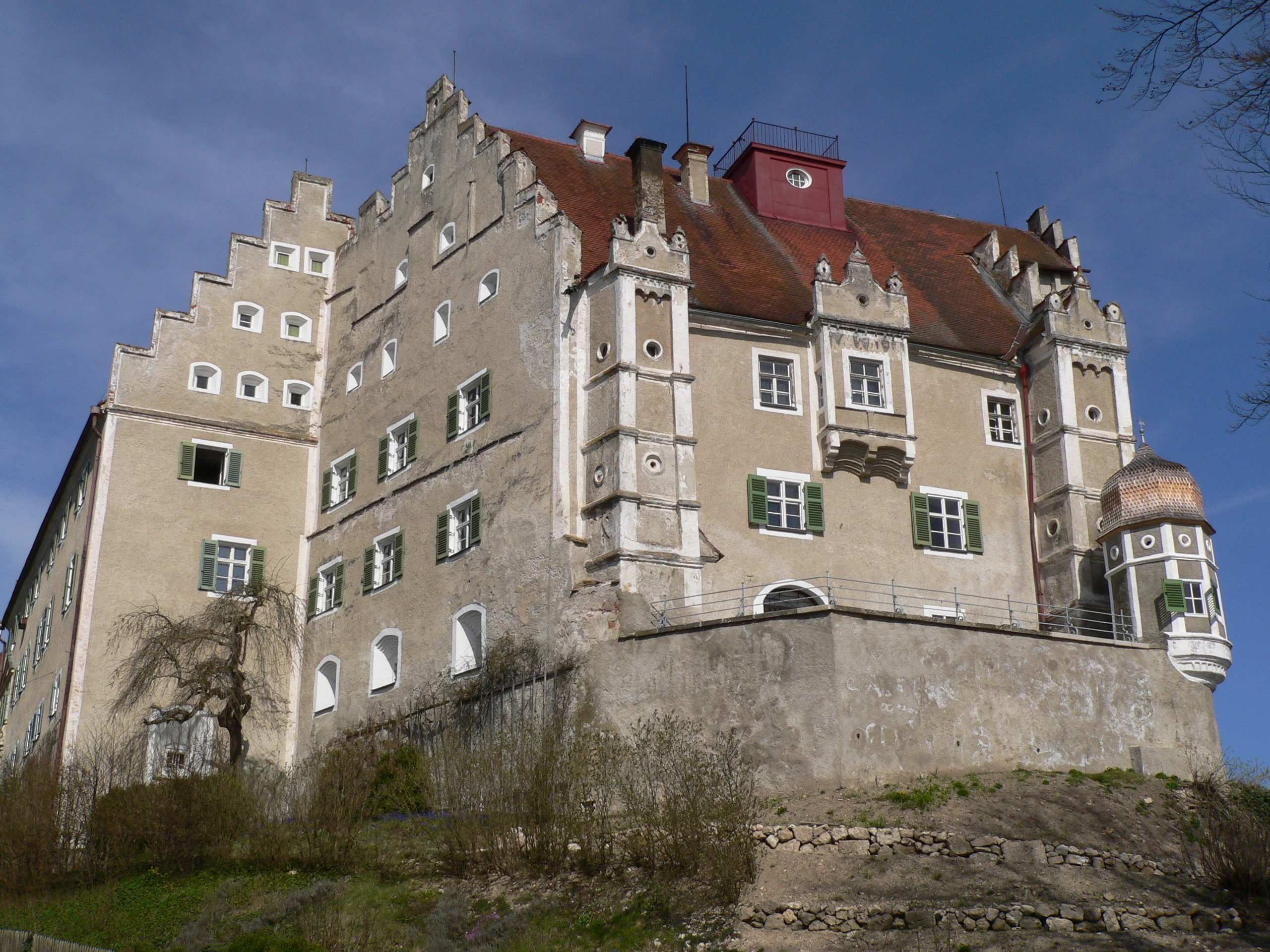 Schloss Südseite